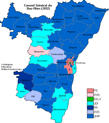 Conseil Général du Bas-Rhin en 2011